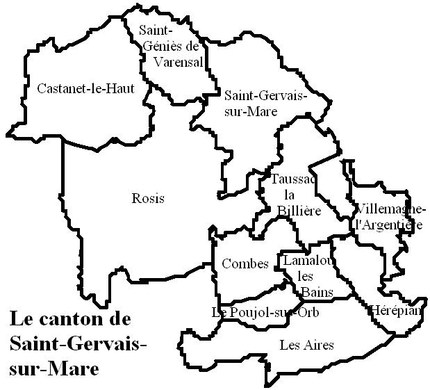 Le canton de Saint Gervais sur Mare Image personnelle